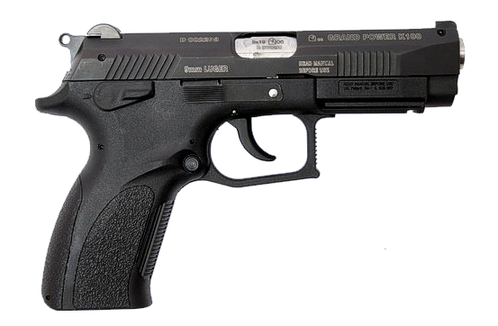 Grand Power pistol